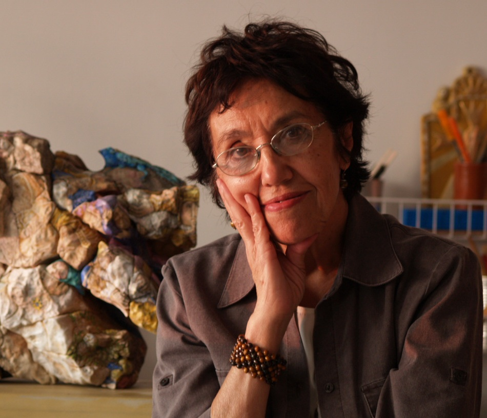 Pepi Sánchez